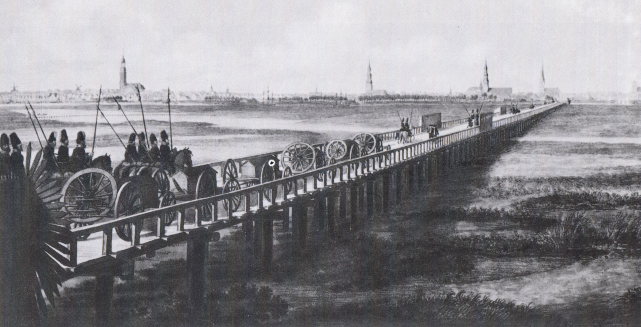 Die Kosaken überqueren während des Kosakenkrieges (1813/14) die Jochbrücke über die Elbe bei Hamburg.